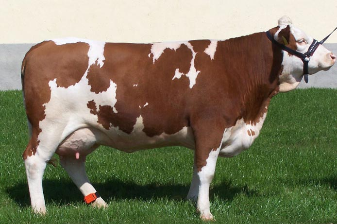 kráva českého strakatého skotu (Czech Fleckvieh cow), chovatel (breeder): Proagro Radešínská Svratka, a.s.